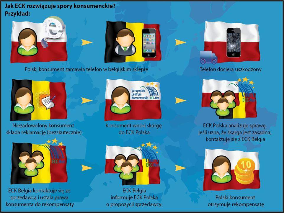 schemat prowadzenia spraw w sieci Europejskich Centrów Konsumenckich